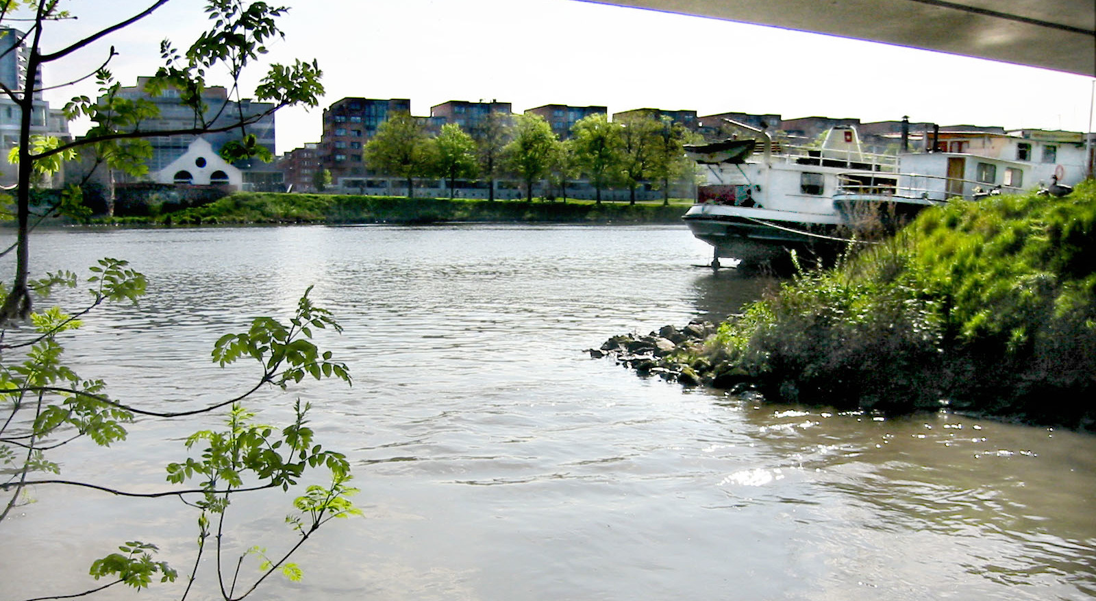 Eigen foto. GerardM 25 apr 2004 08:33 (CEST) De Jeker stroomt in de Maas